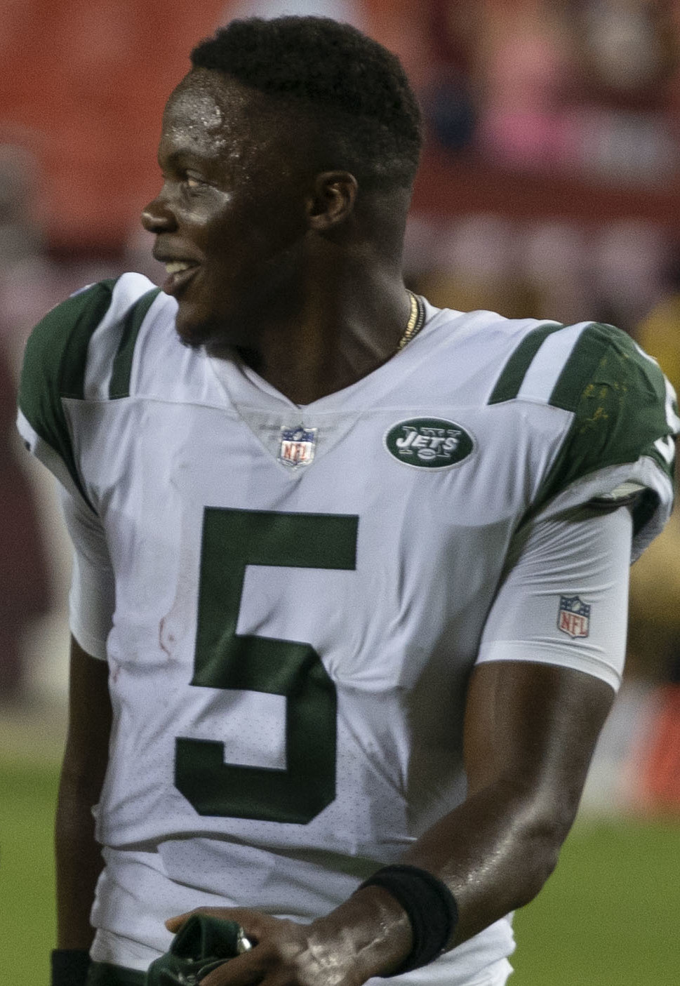 Jets at Redskins 8/16/18